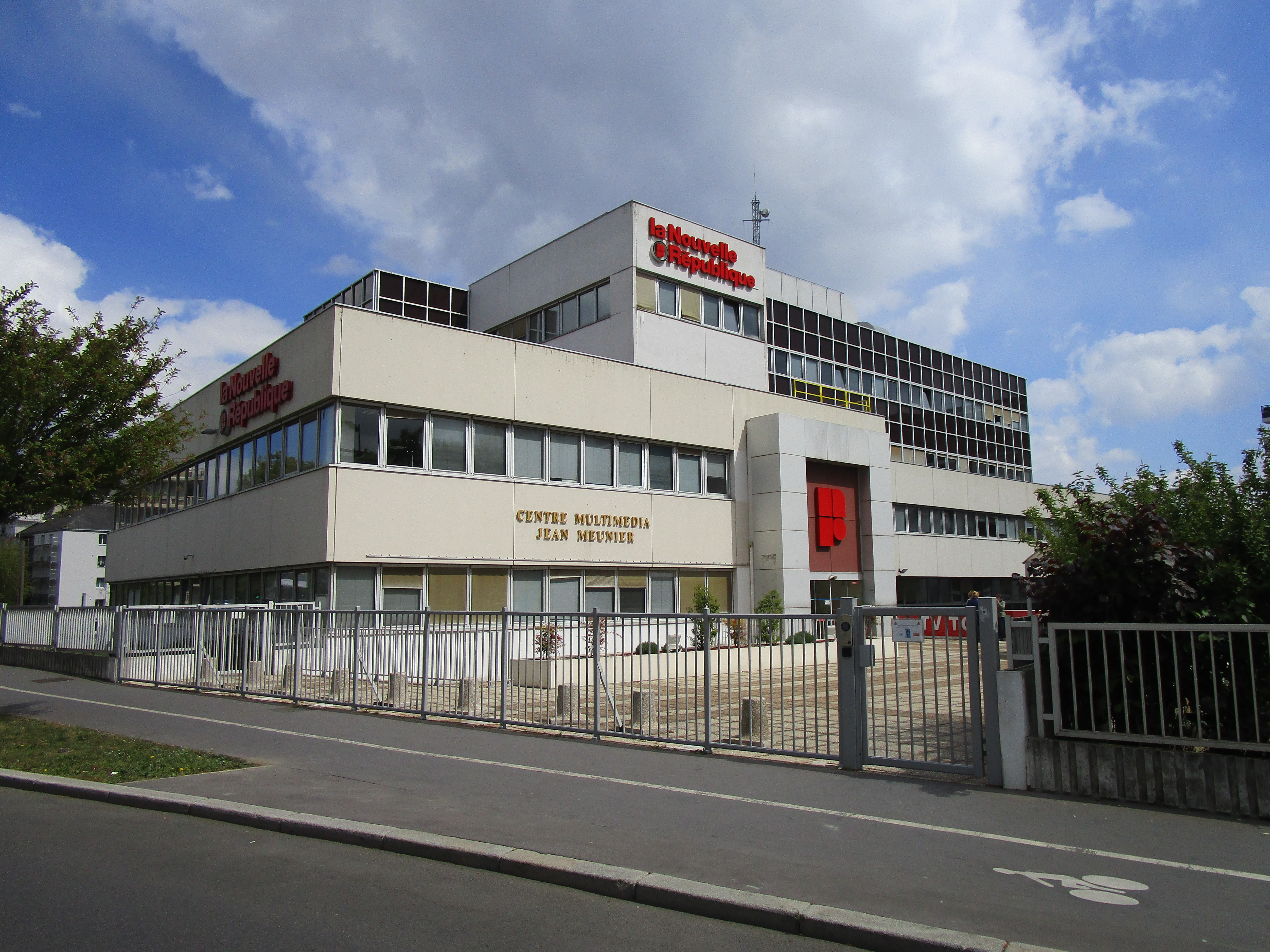 Siège social de La Nouvelle République du Centre-Ouest à Tours, le 26 avril 2017.